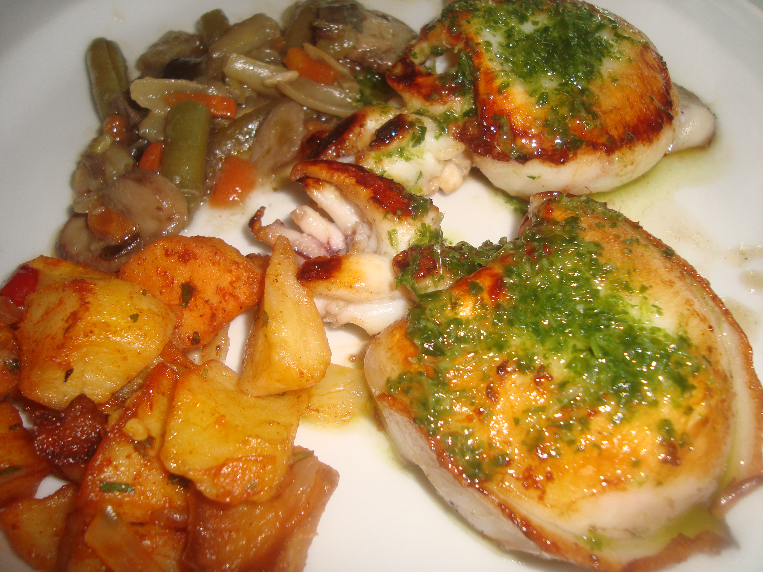 Las enteritas son muy comunes en los bares y restaurantes marineros de la costa norte castellonense. Se trata de sepia a la plancha "enterita" porque se hace entera sin trocear. Se acompaña de salsa valenciana de ajo y perejil picados y emulsionados con aceite de oliva virgen.